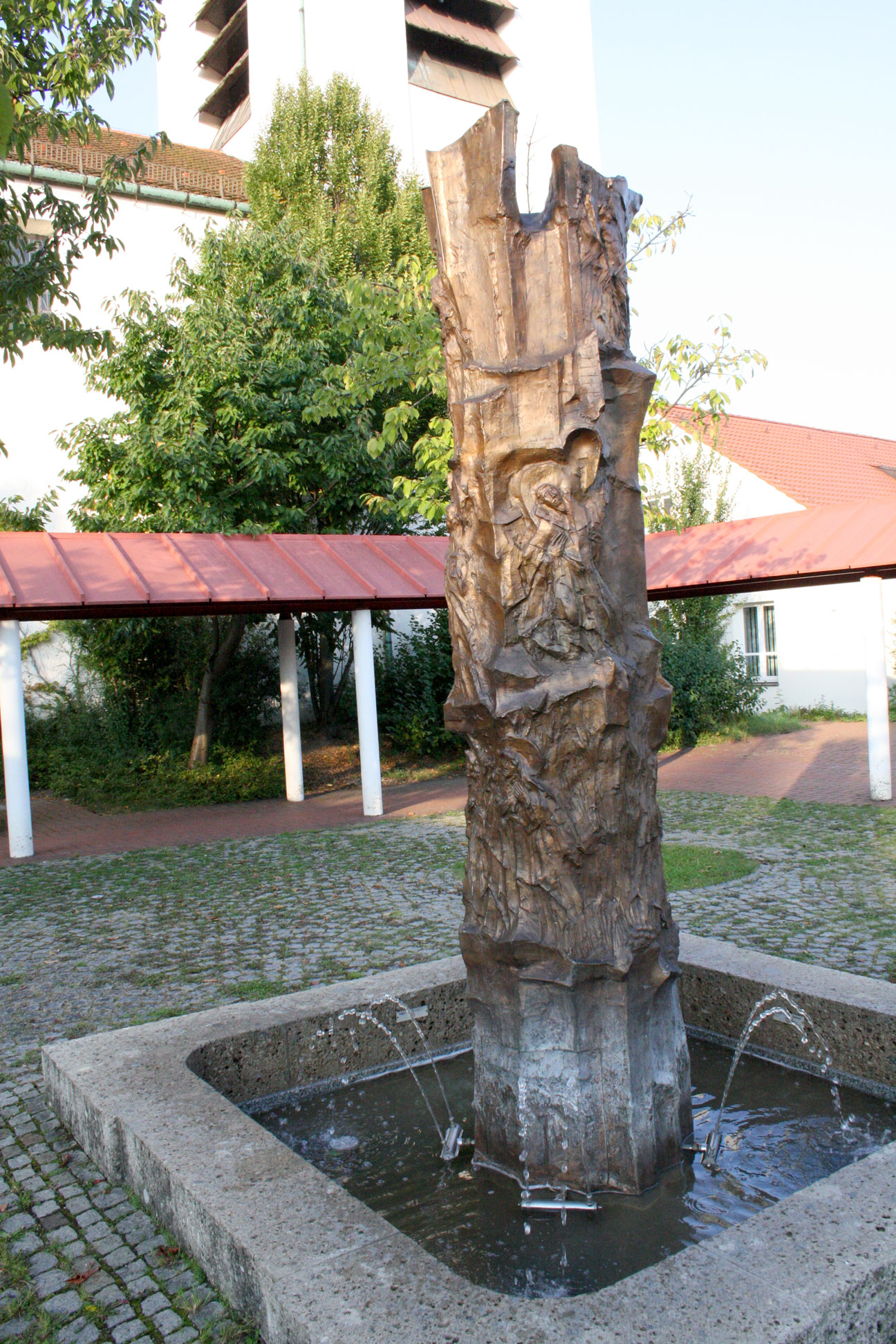 St. Klara im Zamdorf, München, Franziskusbrunnen von Max Faller